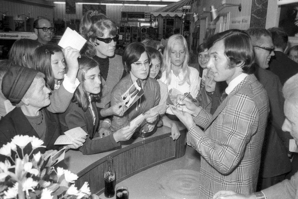 Schlagersänger Karel Gott gibt Autogramme bei Kihr-Goebel